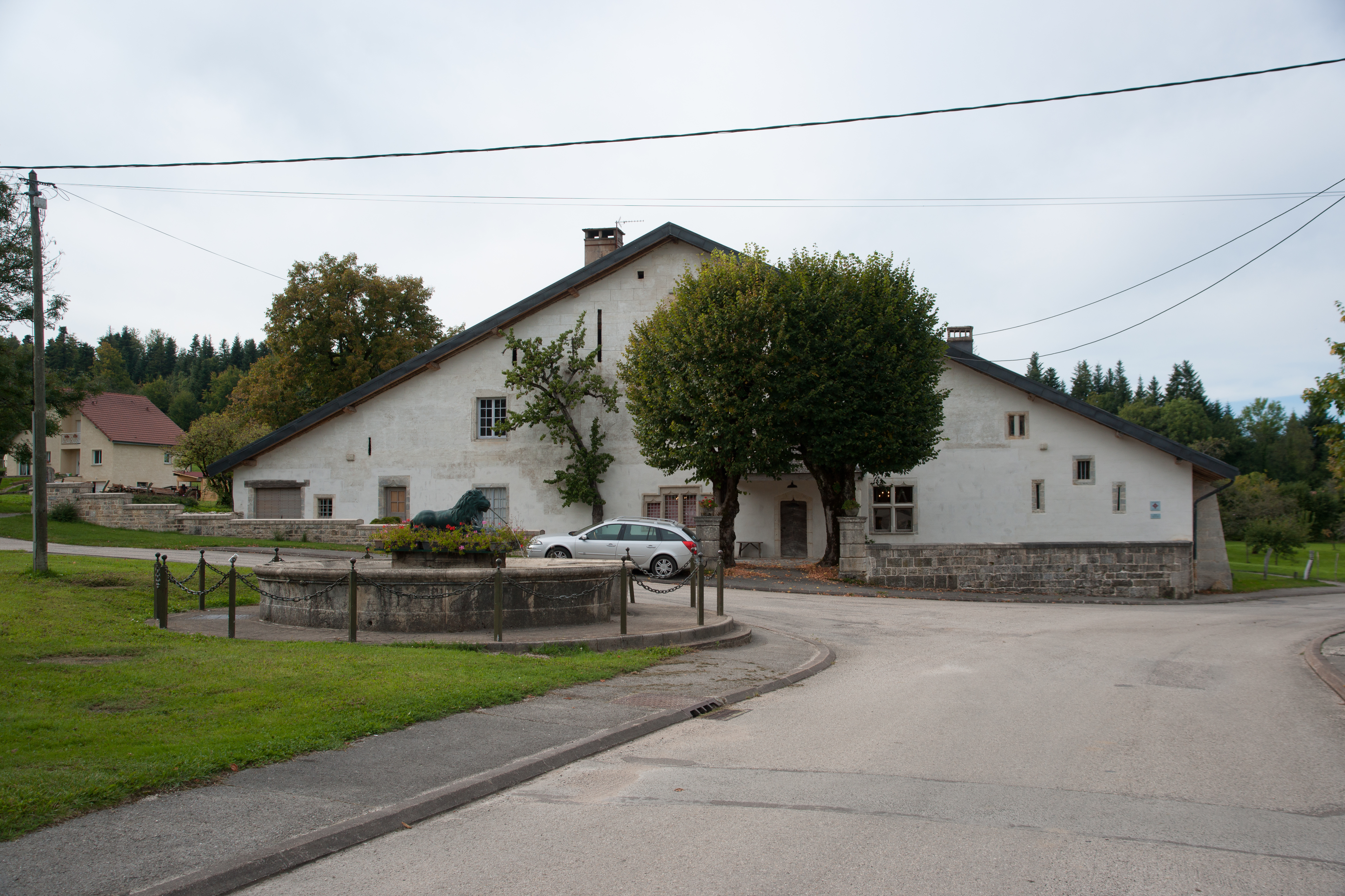 Passonfontaine - ferme .